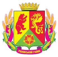 Герб Розівського району